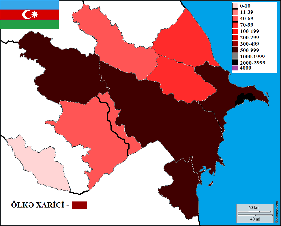 3 iyun 2020-ci il tarixində Azərbaycanda bölgələr üzrə koronavirusa yoluxma halları